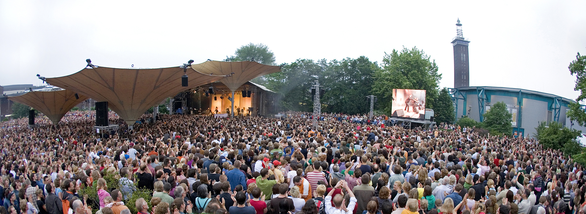 Konzertbesucher bei einem Tanzbrunnen Open Air Konzert